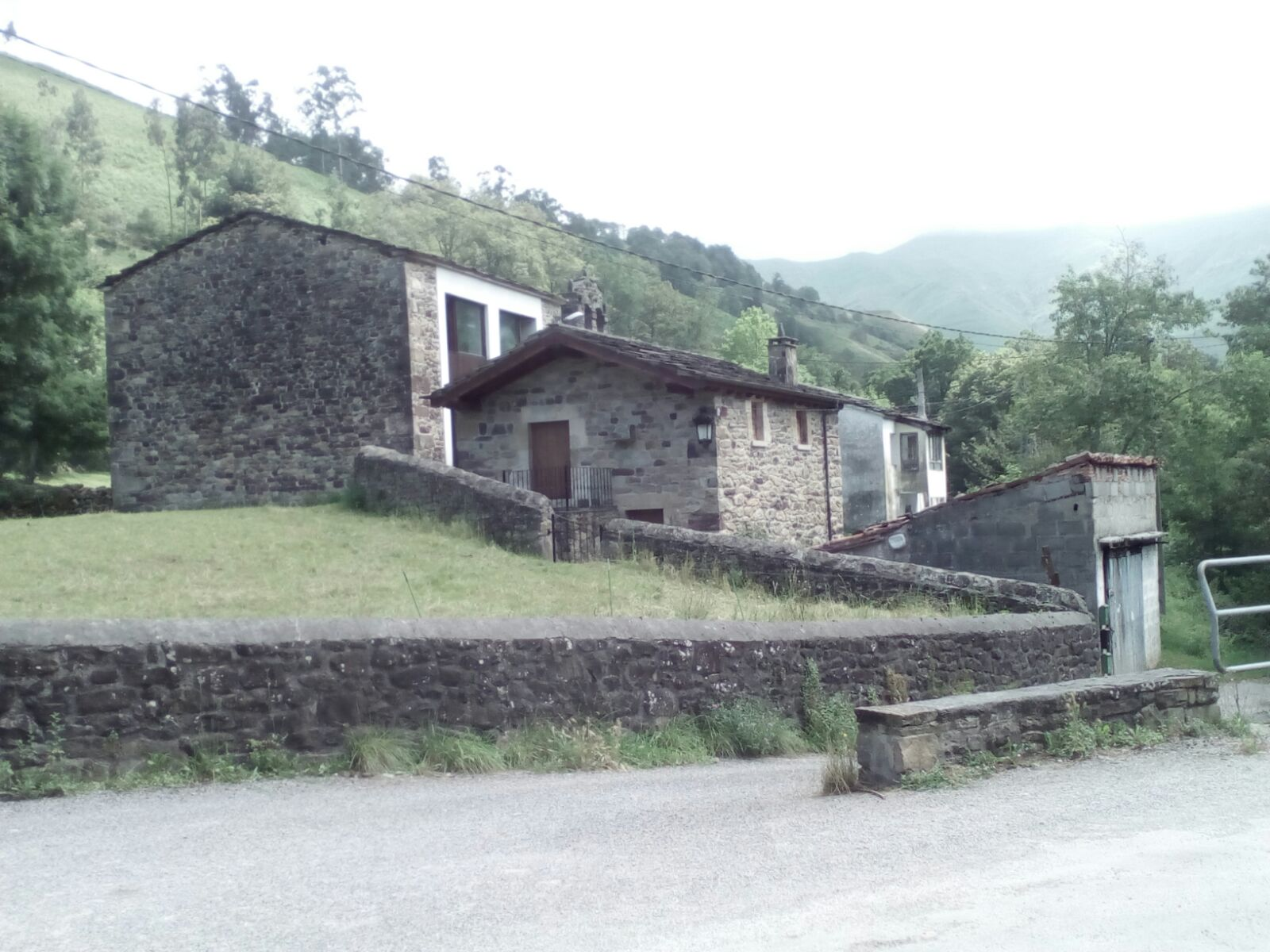 Localidad pasiega de Pisueña en Cantabria.